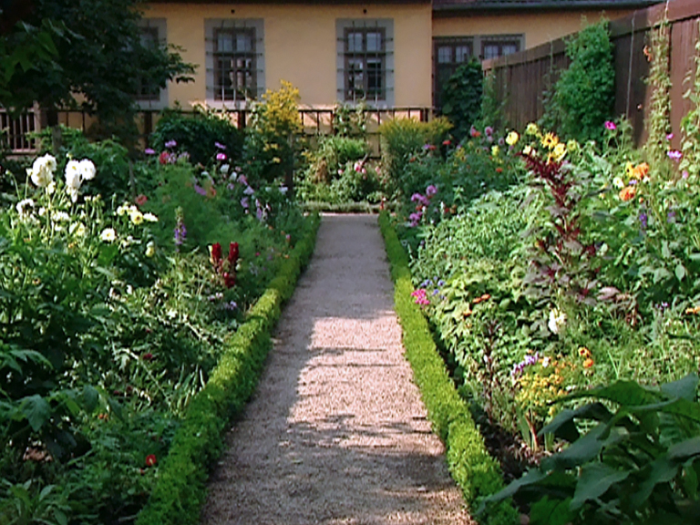 Goethes Garten in Weimar